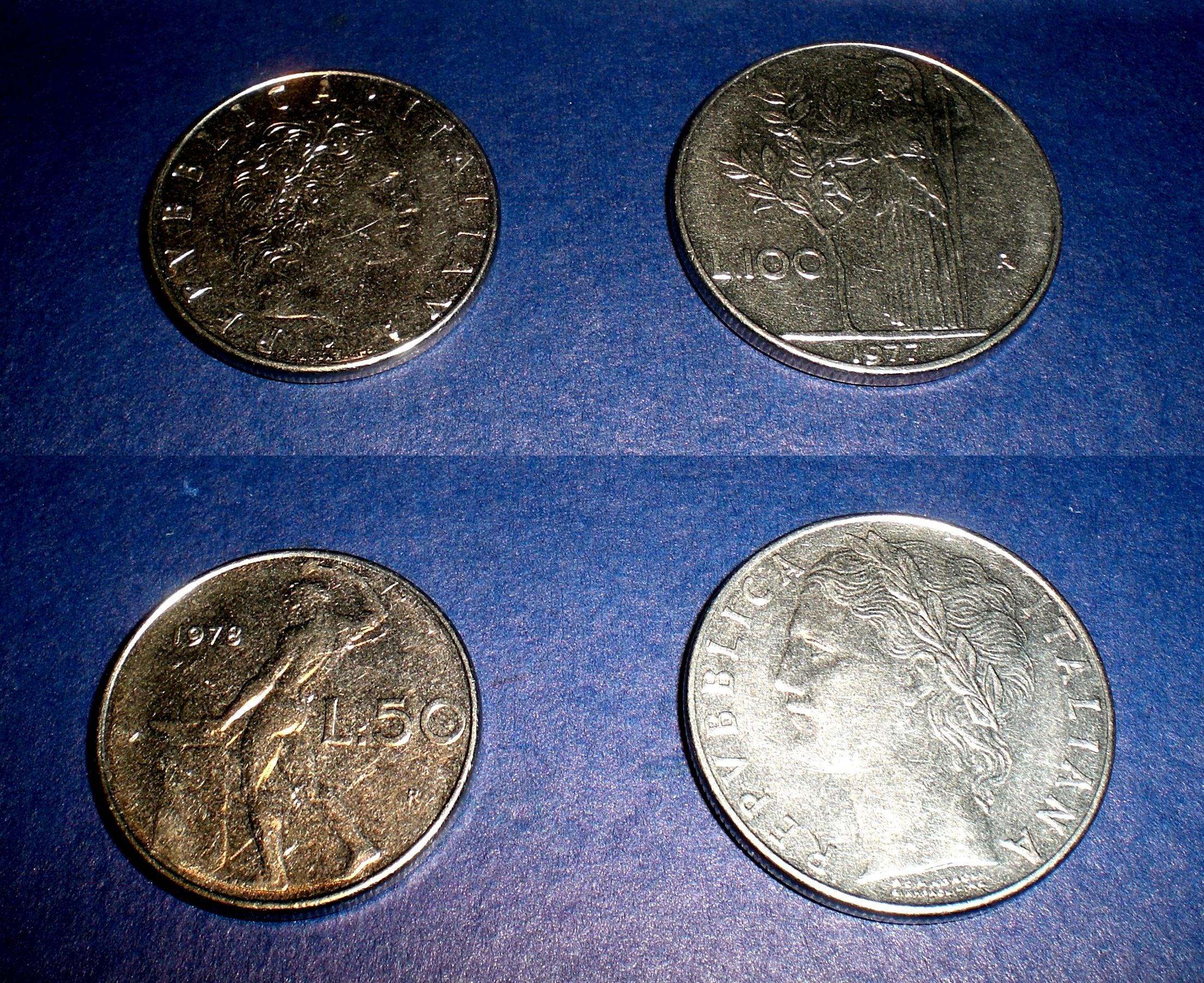 Ambaú flankoj de la moneroj de 50 kaj 100 italaj liroj